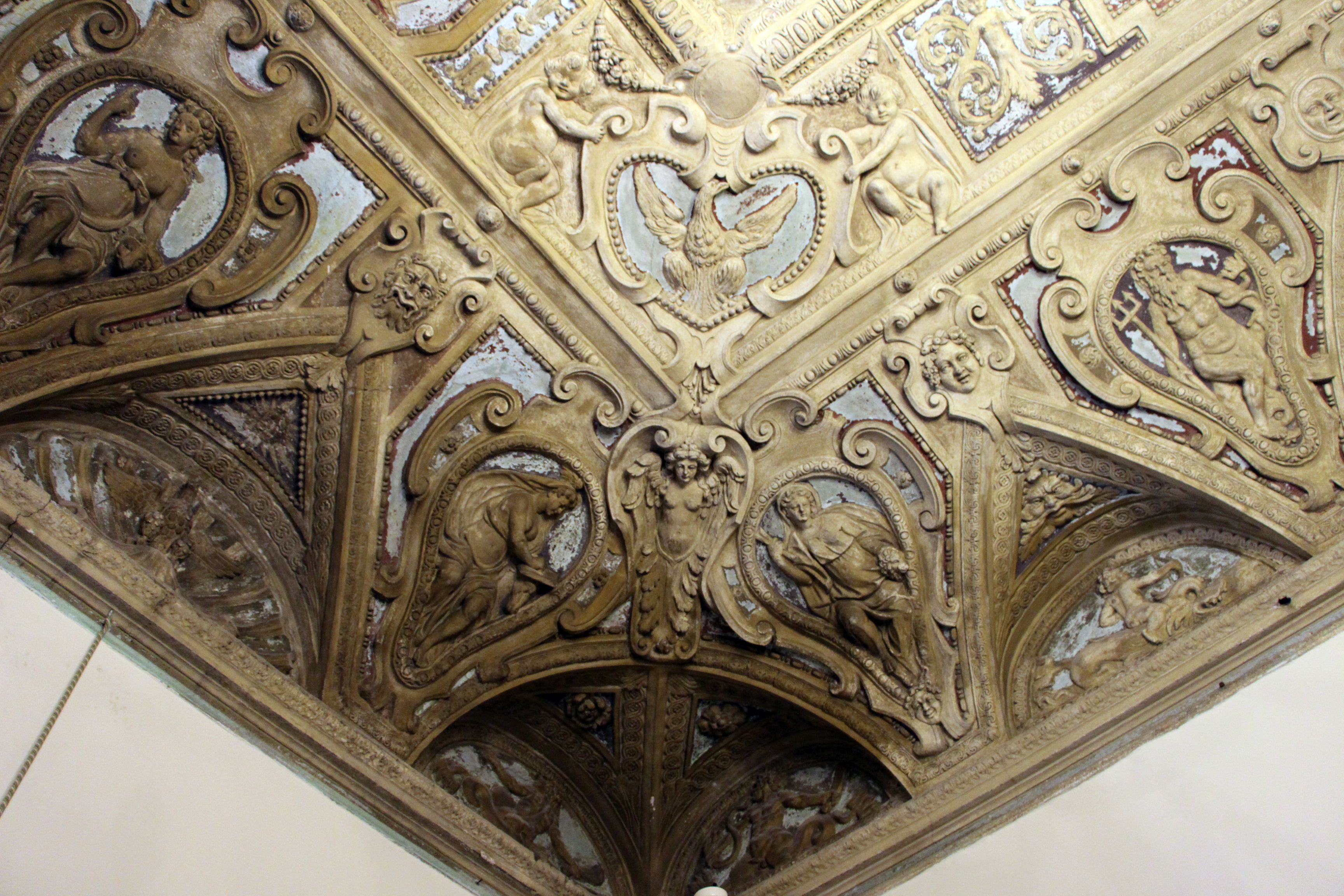 Villa del Principe (Genova)